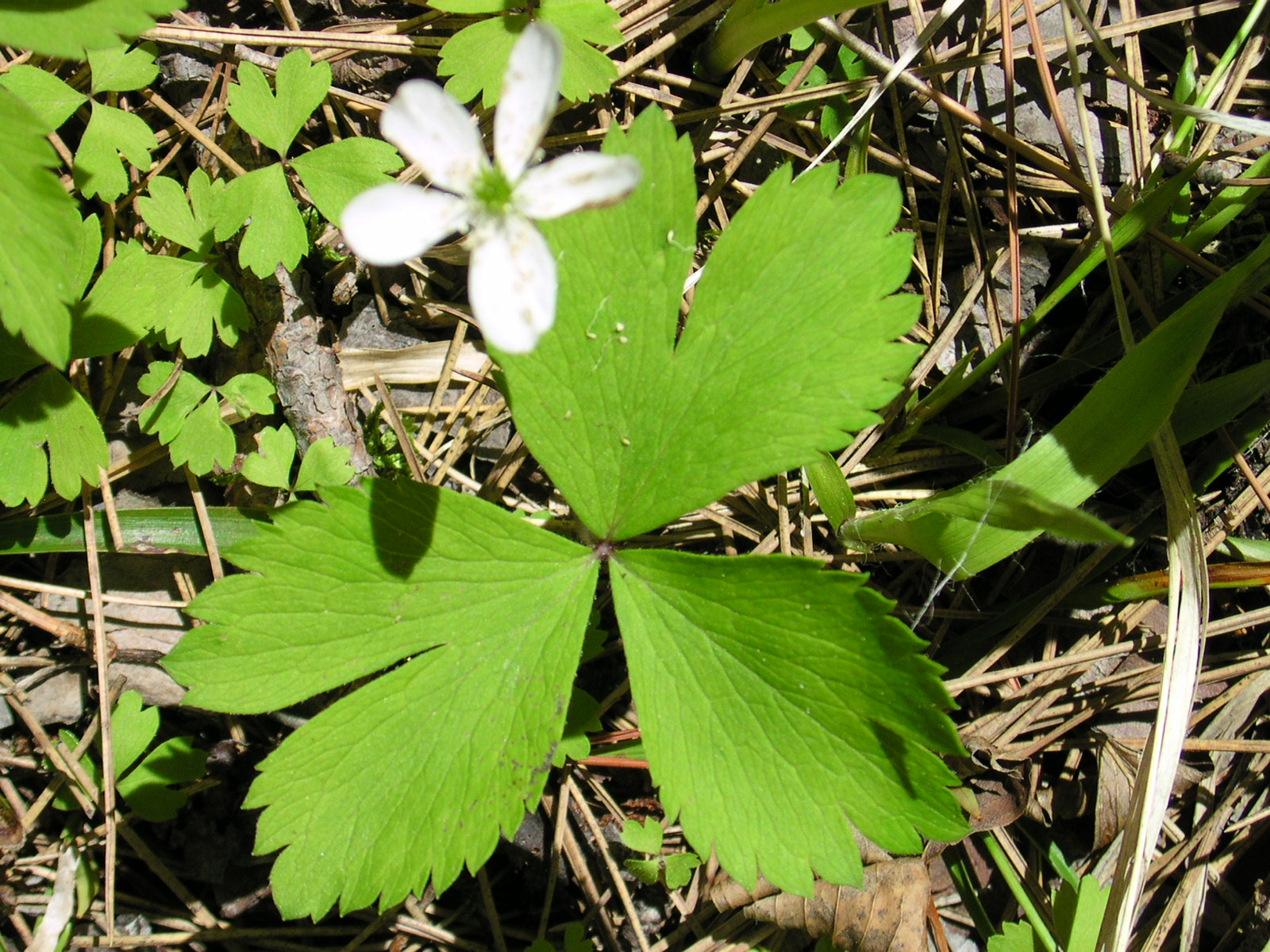 Anemone_quinquefolia_5